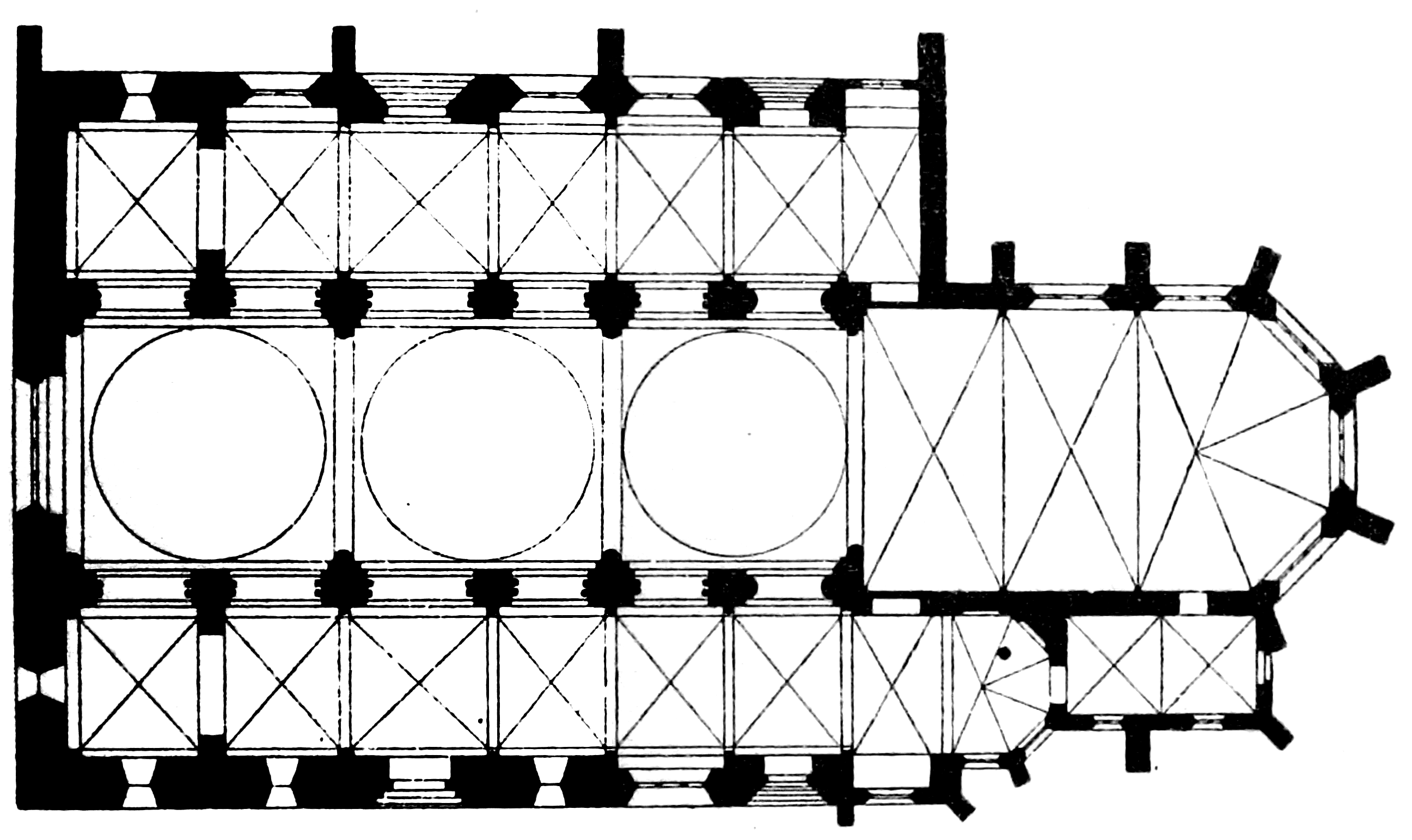 Dortmund, Marienkirche, Grundriss, Zeichnung